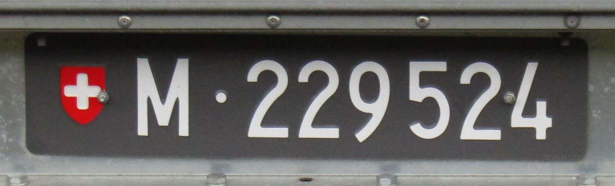 Militär Anhänger Kontrollschild Schweiz